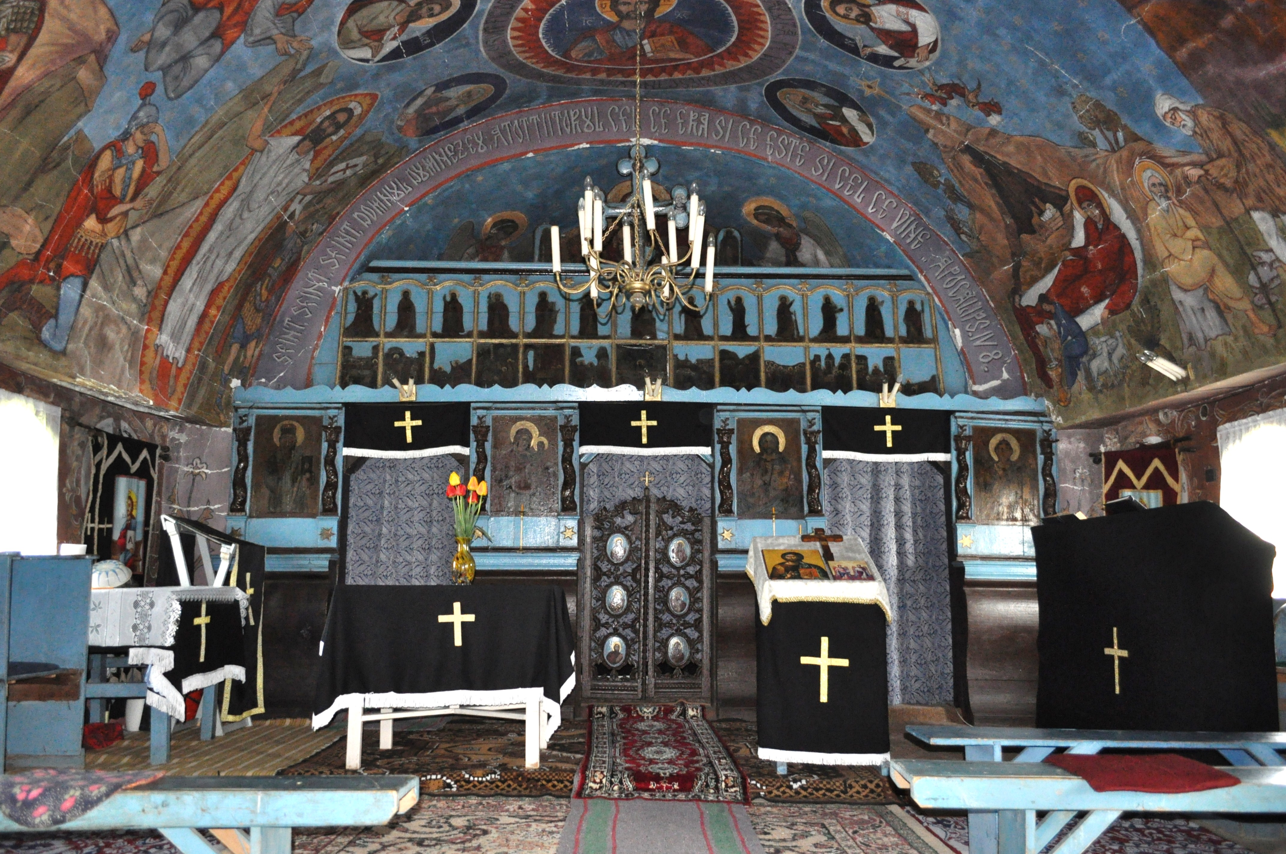 Biserica de lemn, sat aparţinător SFÂNTU GHEORGHE; oraş IERNUT